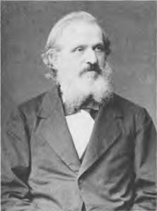 Portrait von Friedrich Kurd von Alten, oldenburgischer Oberkammerherr, Archäologe sowie Leiter der Großherzoglichen Sammlungen.